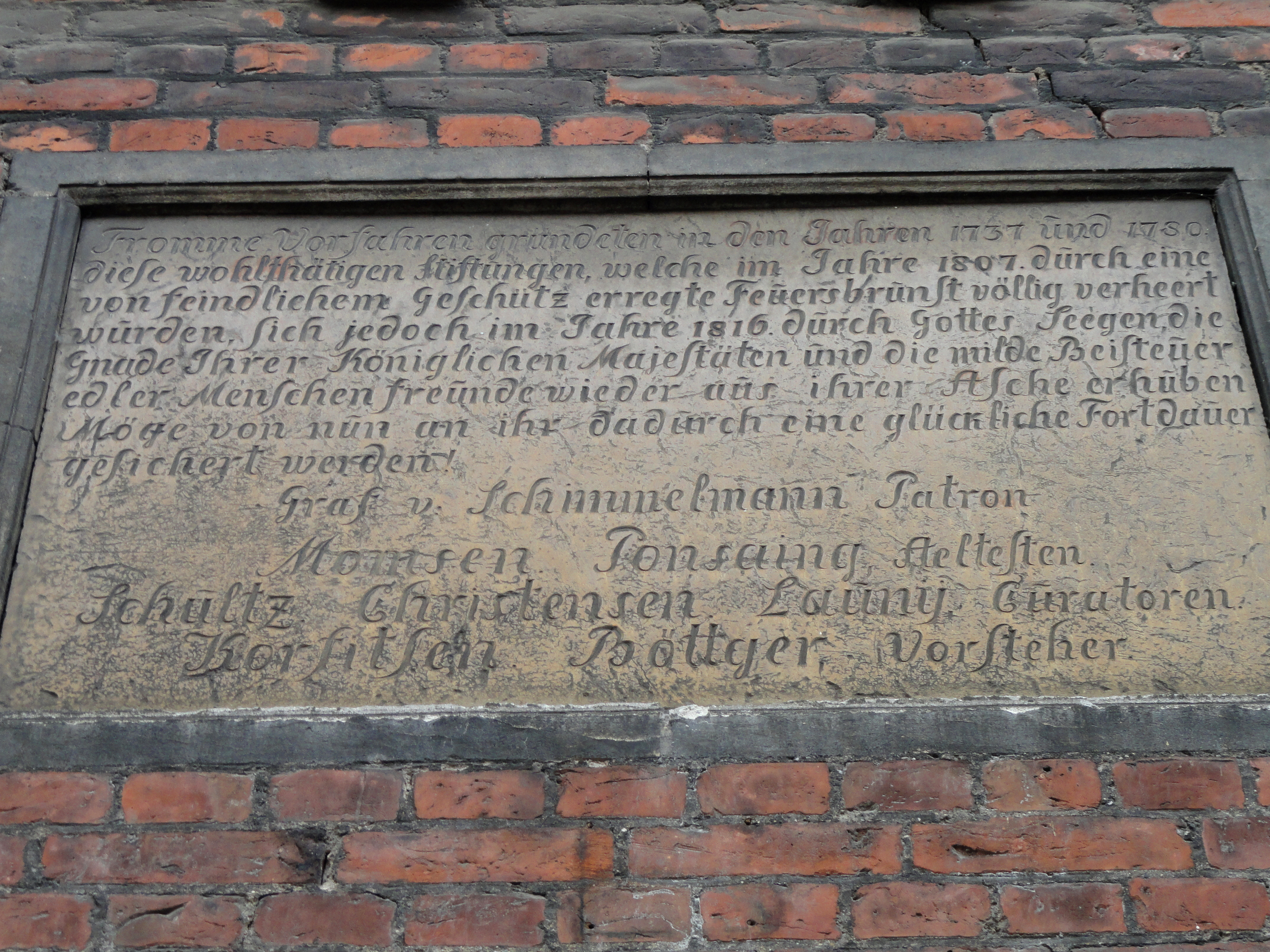 Larslejsstræde 7 plaque, Copenhagen, Denmark.